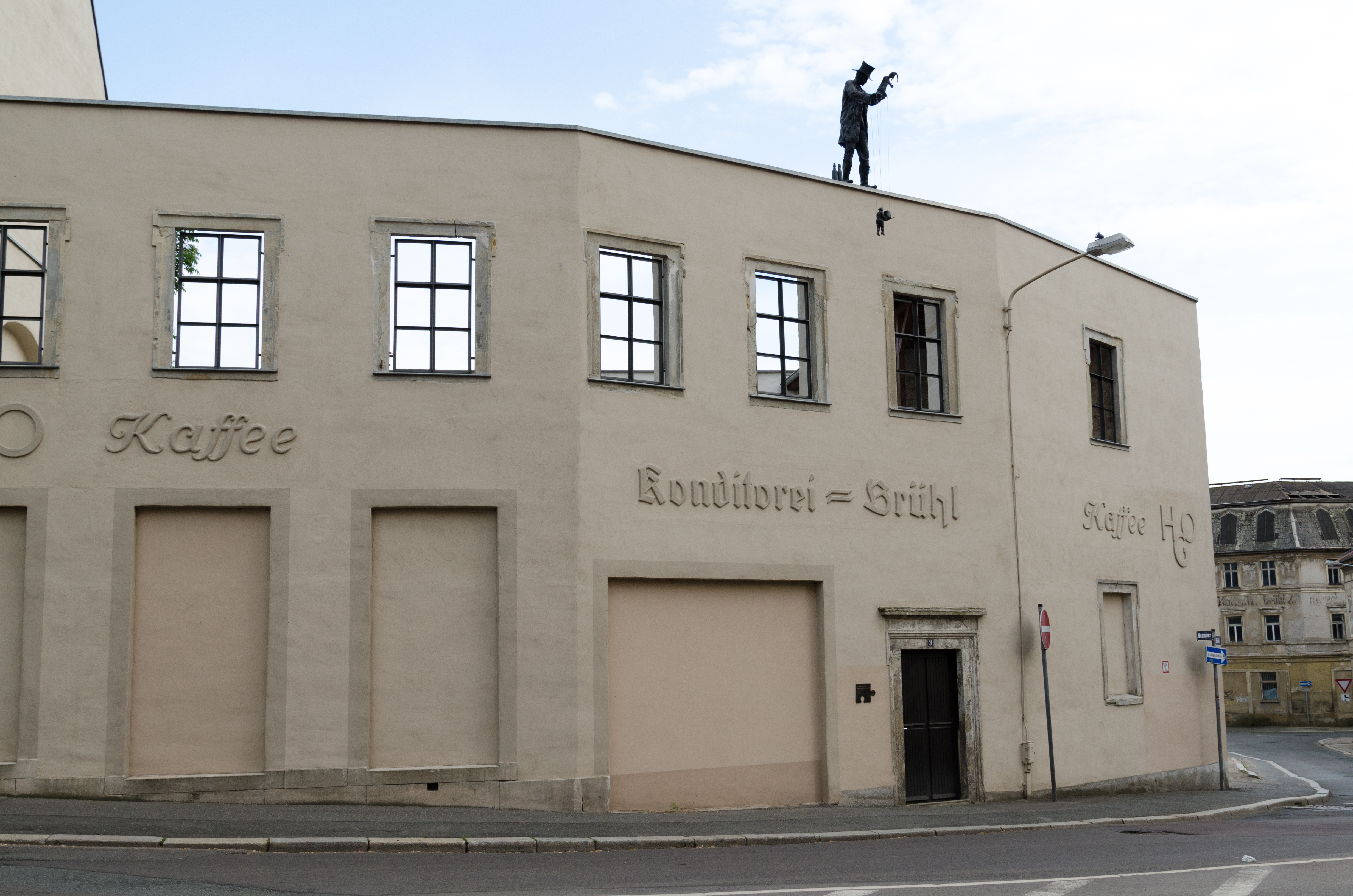 Zeitz, Nicolaiplatz 9